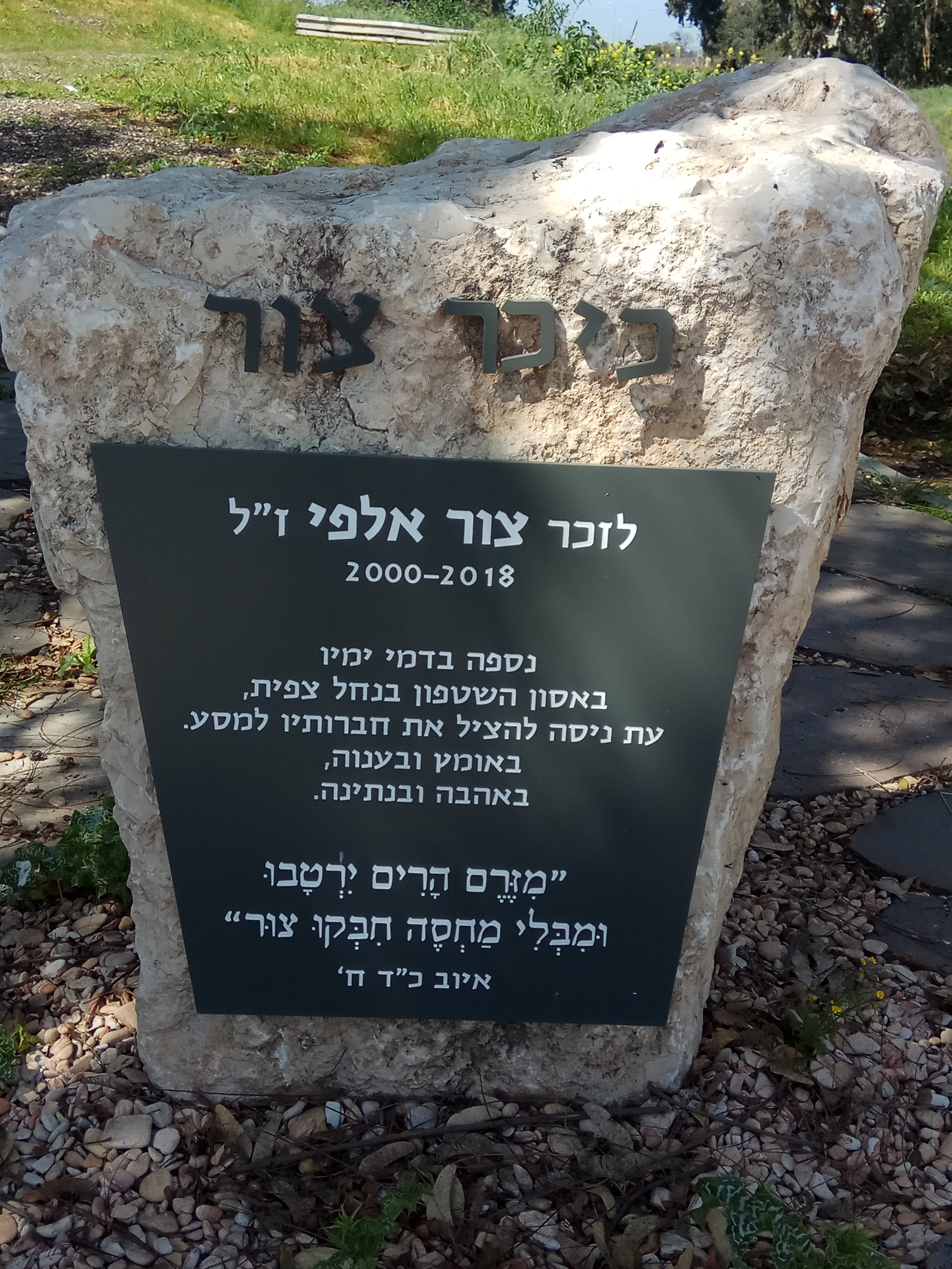 כיכר במזכרת בתיה ע"ש צור אלפי שנספה באסון נחל צפית